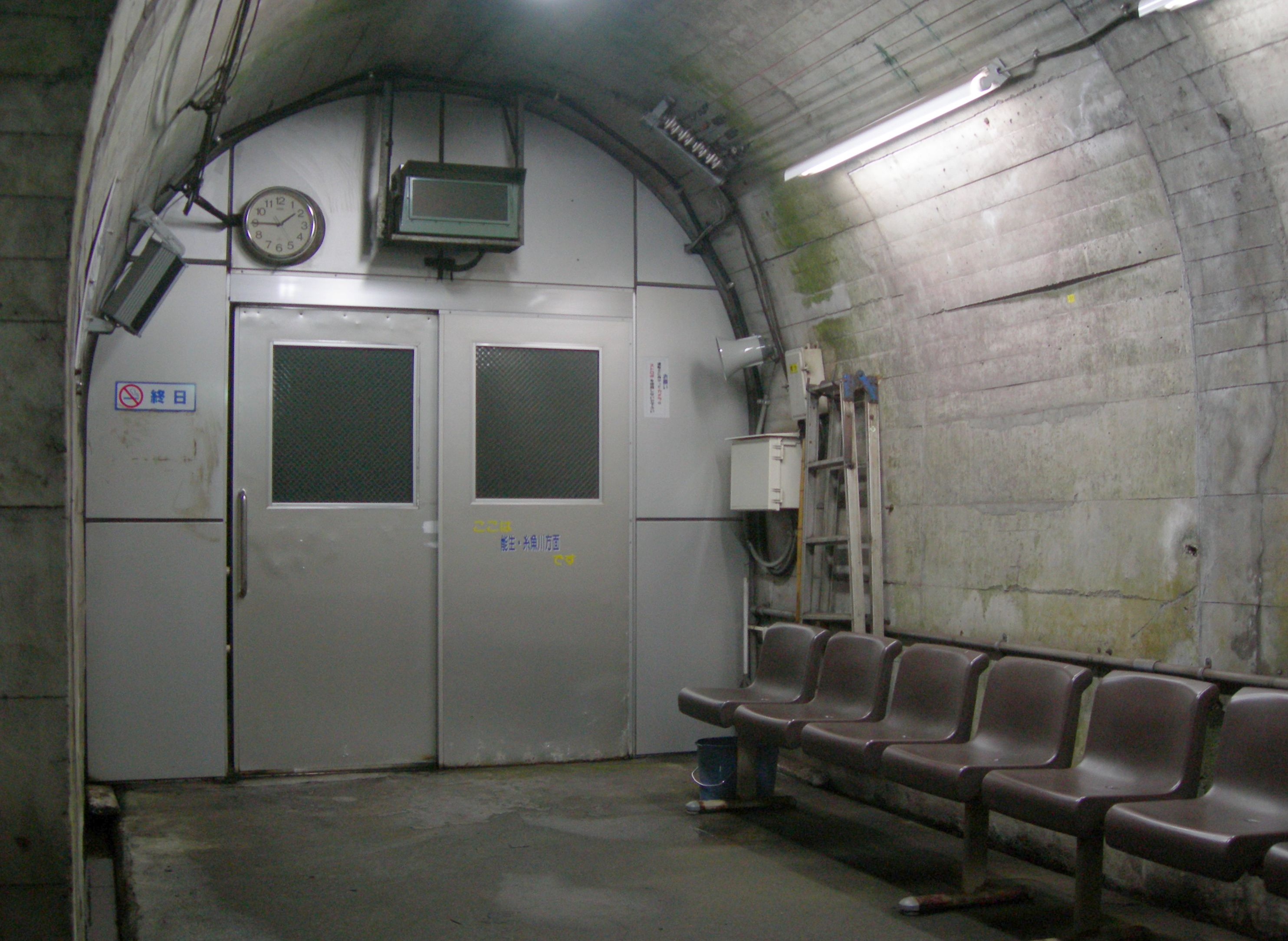 筒石駅の上りホームの待合室